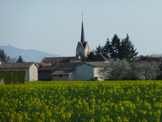 Vue d'Arnas